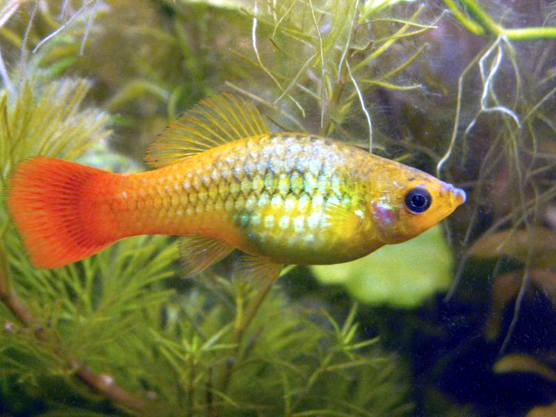 Papagaienplaty Zuchtform